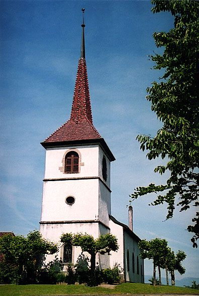 Kirche von Bercher im Juni 2001